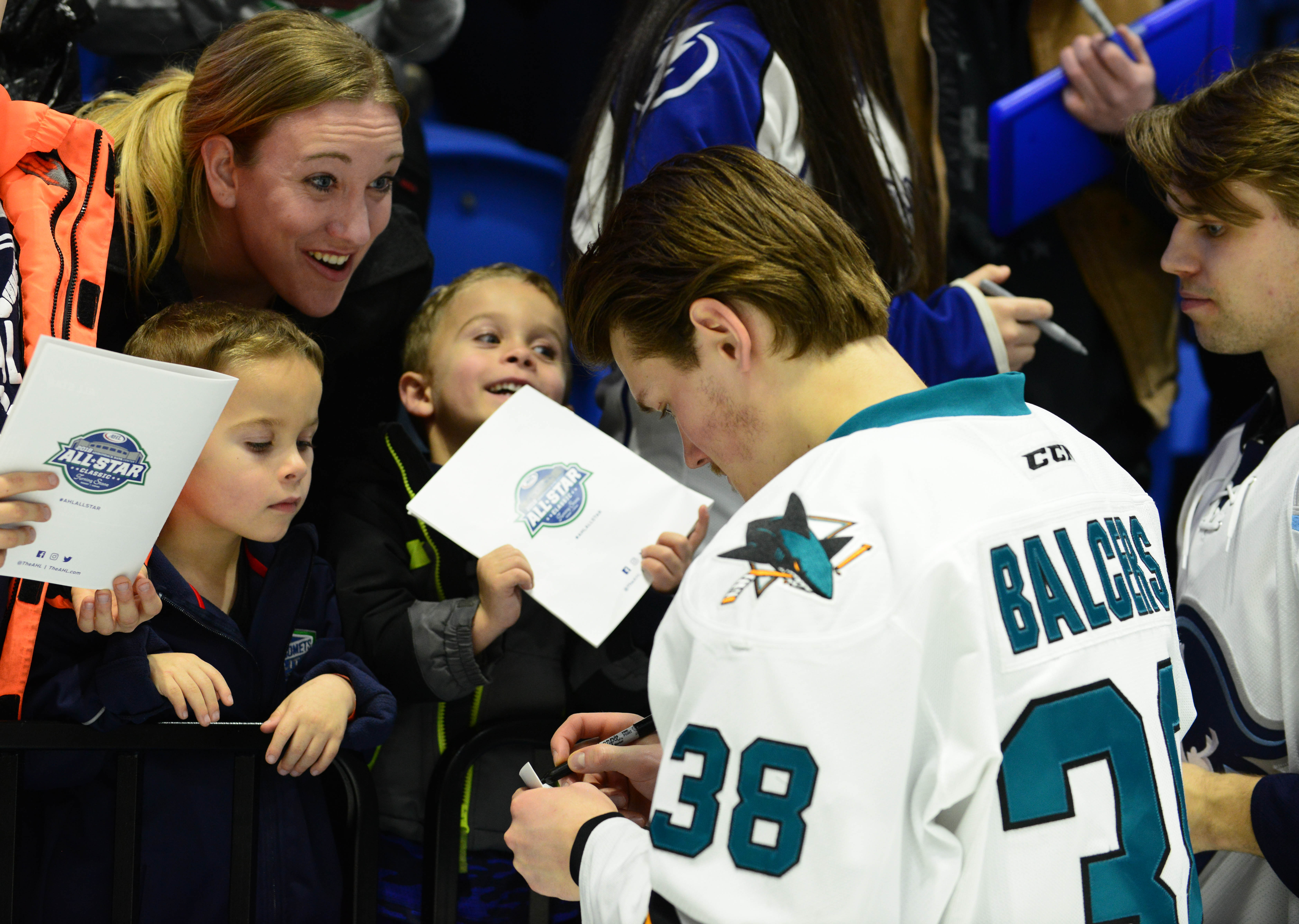 (Bryan Peck/ AHL)